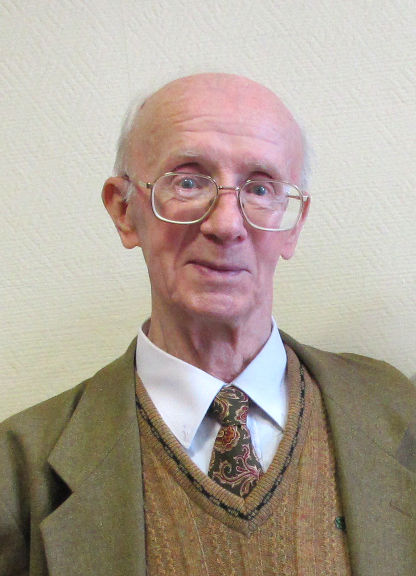 Фотография Судакова В.Б. выполнена в помещении ОАО «ВНИИГ им. Б.Е. Веденеева» в преддверии 70-й годовщины полного снятия блокады Ленинграда 24.01.2014г.